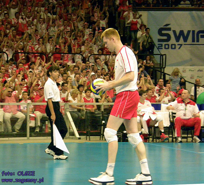 Liga Światowa 2007 najlepszy rozgrywający Paweł Zagumny, (mecz Polska-Bułgaria). 2007 FIVB World League Paweł Zagumny (Best Setter).